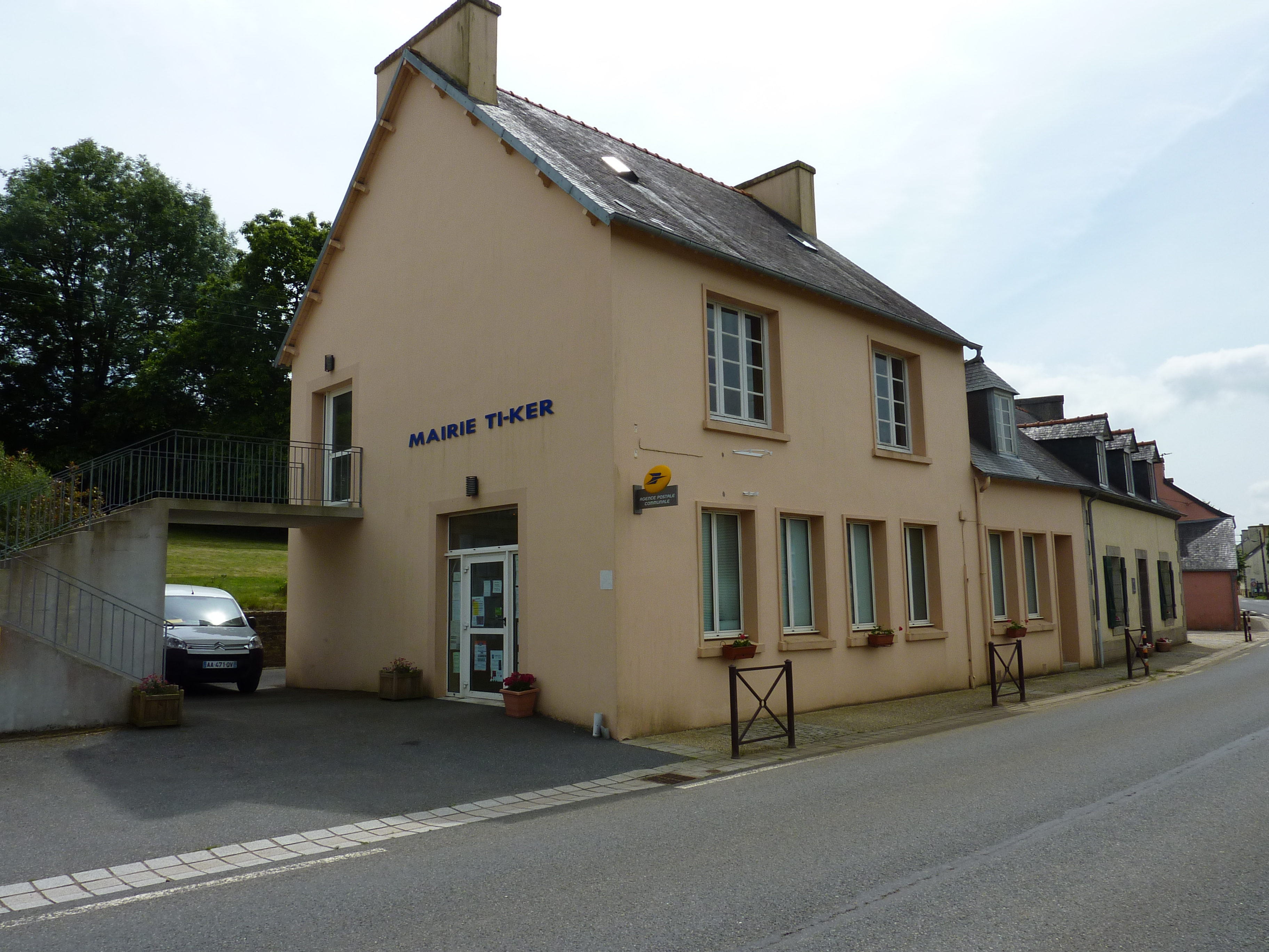 Lannédern: la mairie-poste